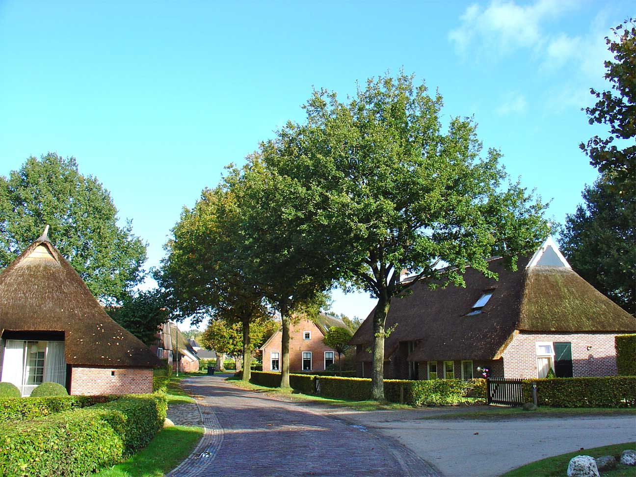 Norg (dorpsgezicht)